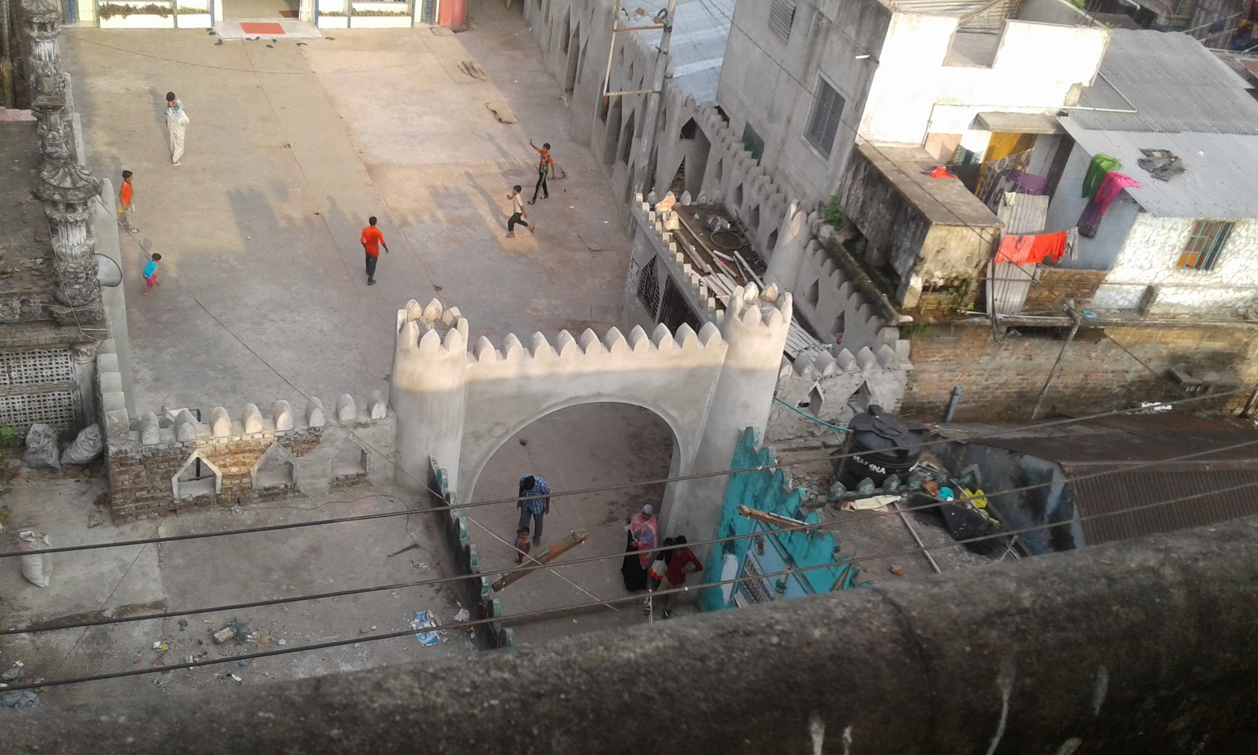 বদর আউলিয়ার মাজারের প্রবেশদ্বার।